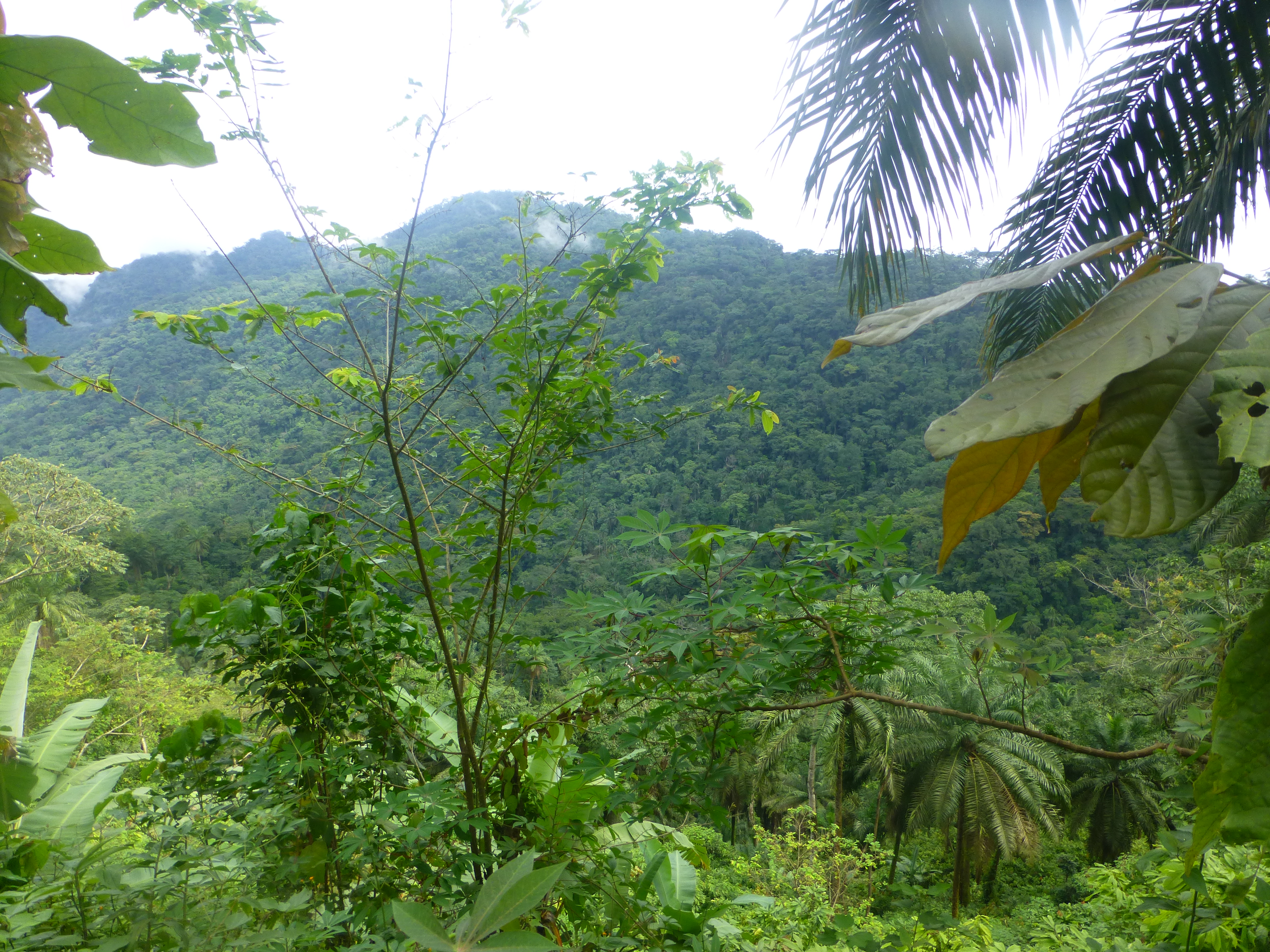 Sanctuaire de Bayang Mbo